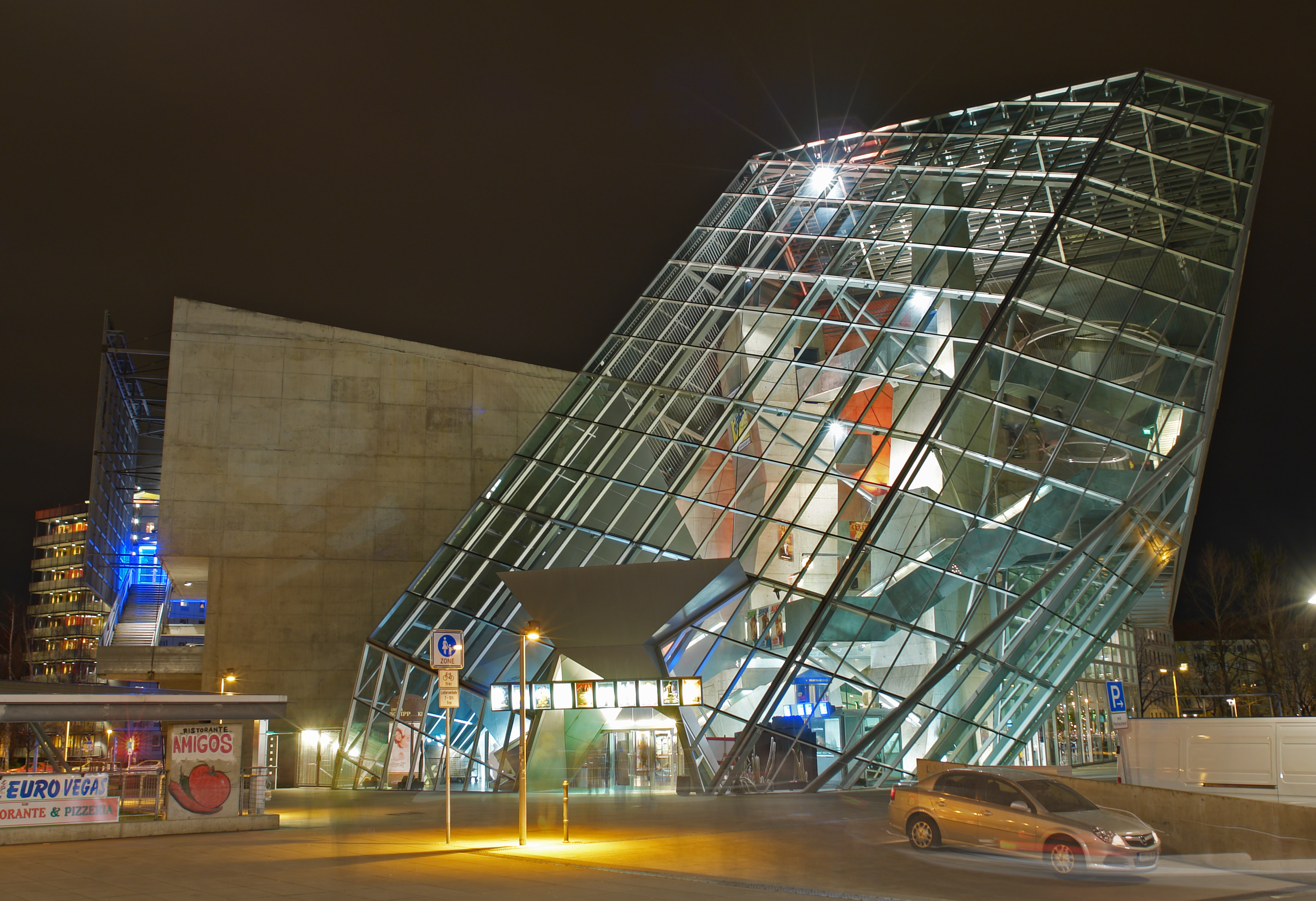 UFA-Kristall Filmpalast